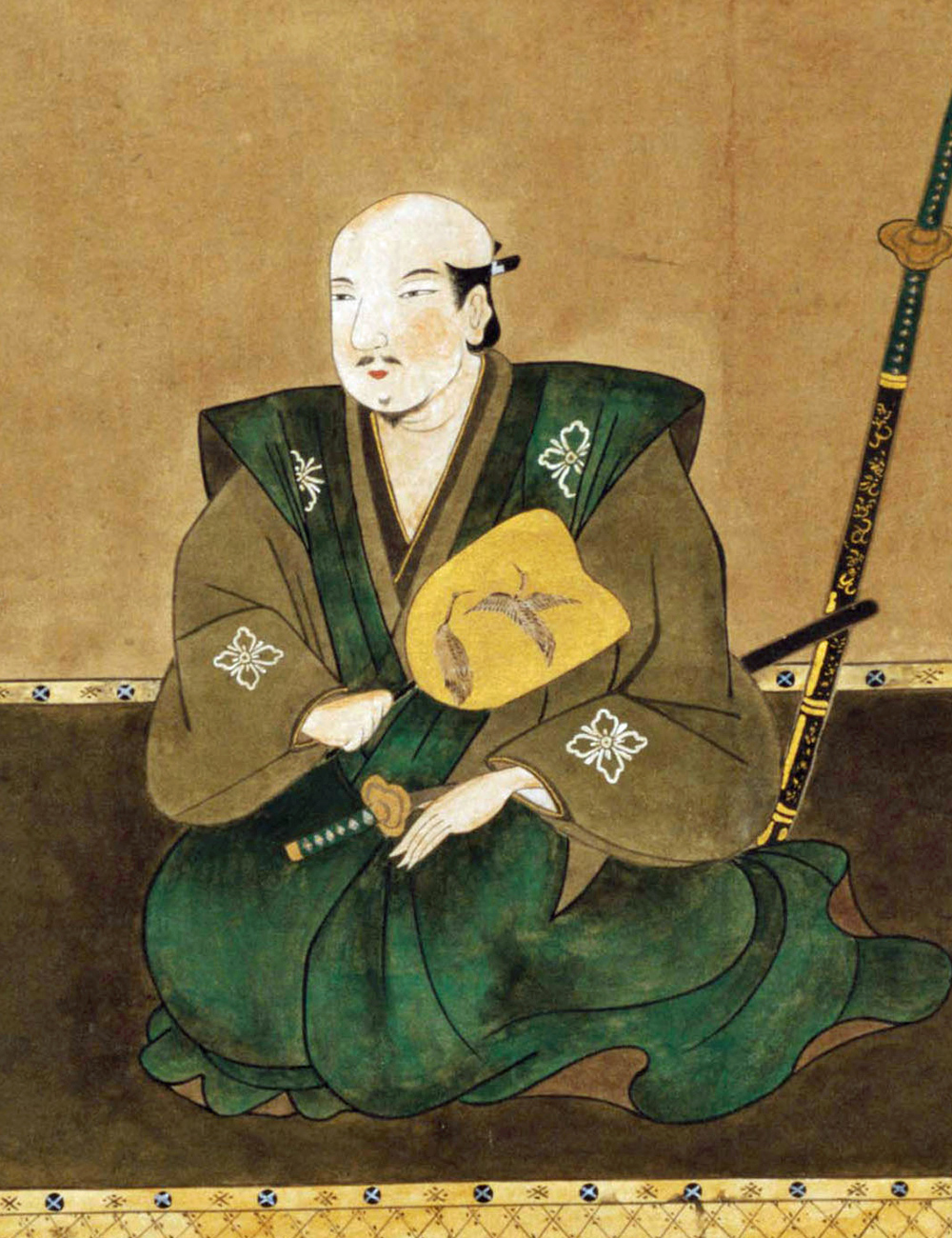 武田勝頼（1546 - 1582）の肖像画（部分）